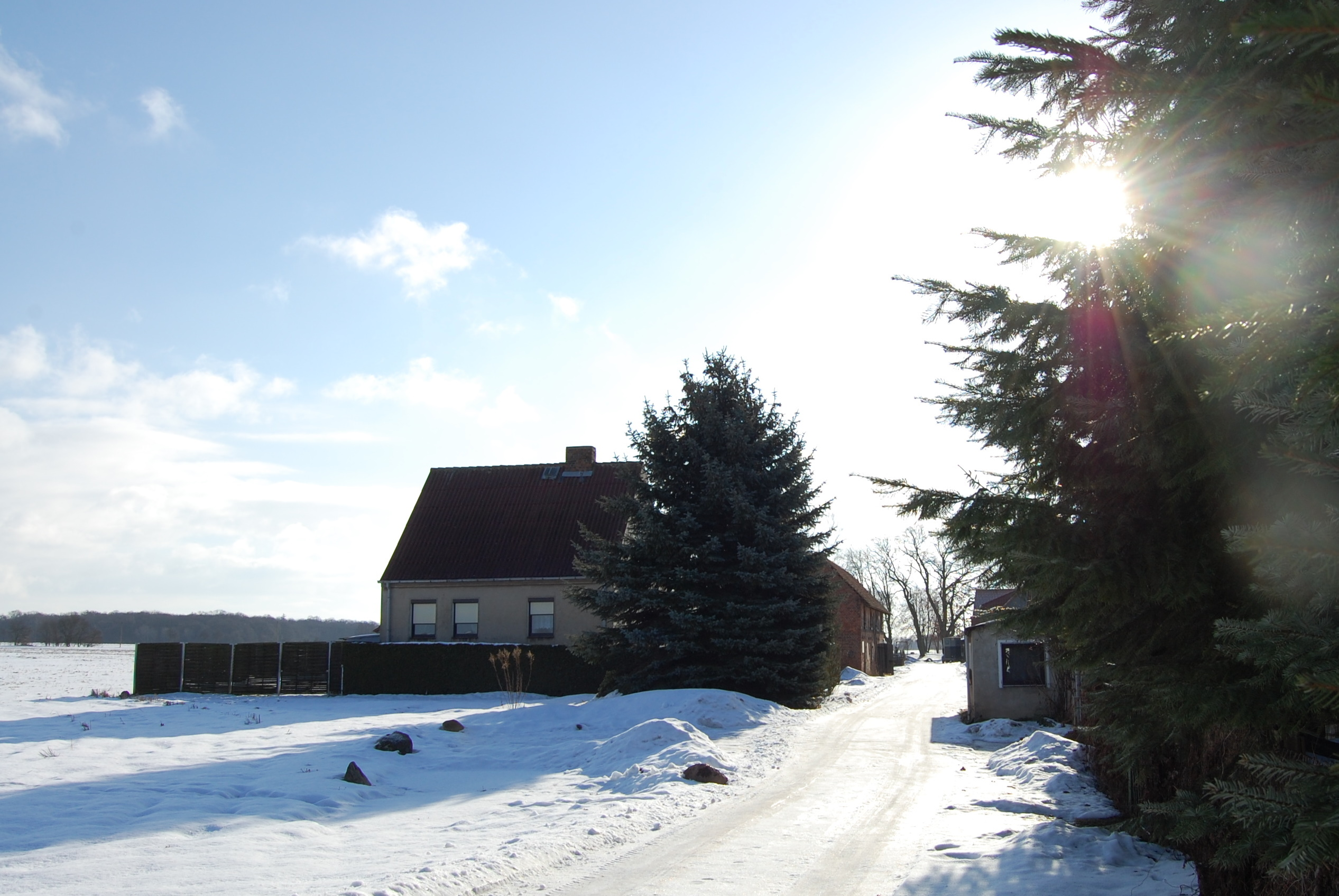 Detzel im Winter, Blick auf den nördlichen Zugang zum Ort